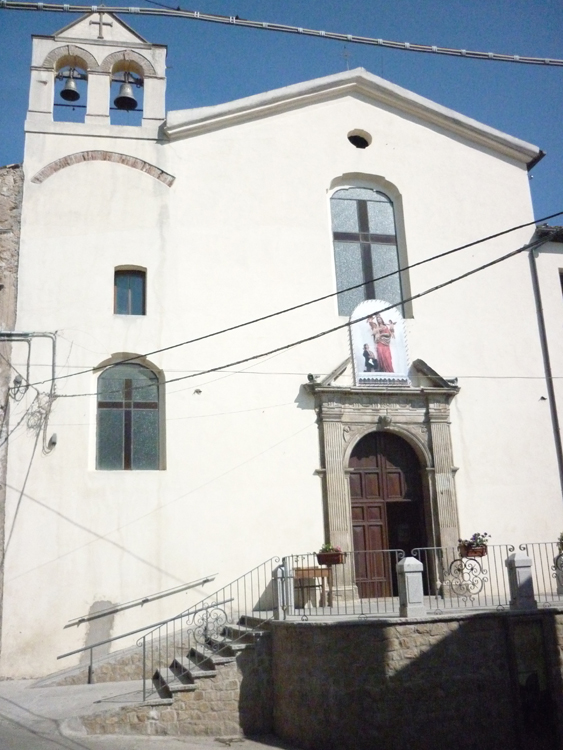 San Giovanni in Fiore - Chiesa della Madonna della Sanità, facciata